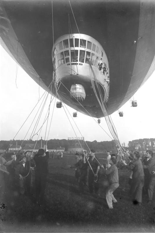 Zur glückhaften Fahrt des deutschen Zeppelinluftschiffes nach Aegypten! Eine interessante Aufnahme der grossen Führergondel und der 5 Motoren.